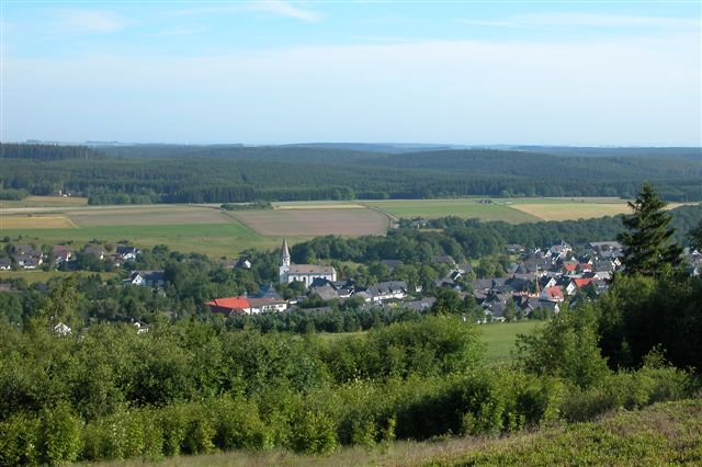 Scharffenberg, Sauerland